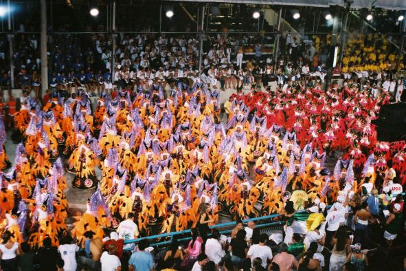 Défilé des écoles du groupe spécial au sambodrome lors du carnaval de Rio 2004 Une des alas (ailes) de l'école Imperatriz Photographie prise par utilisateur:Clem Cousi Utilisateur:Clem Cousi